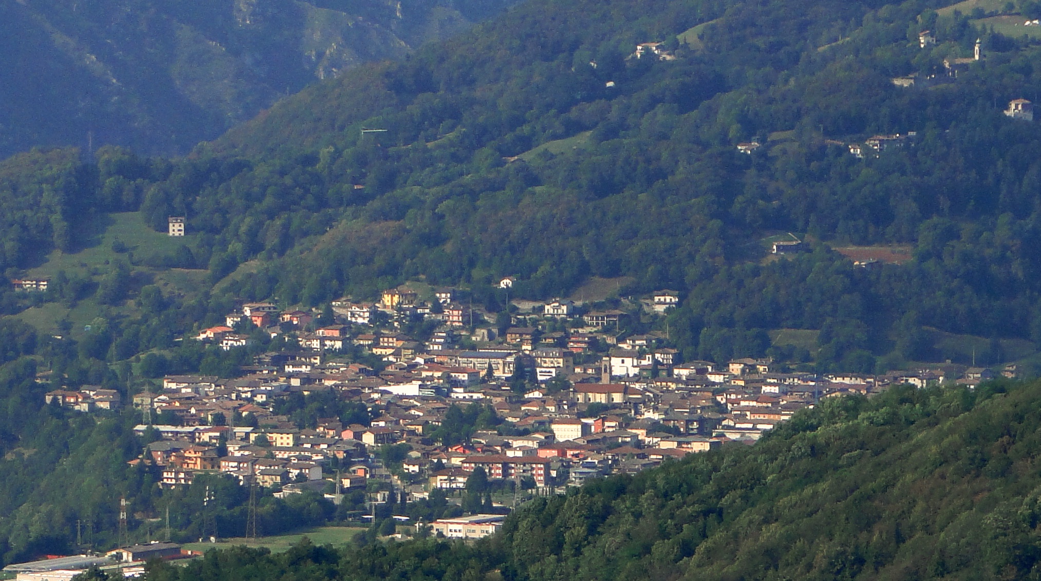 Panoramica su Casnigo, Bergamo. Italia